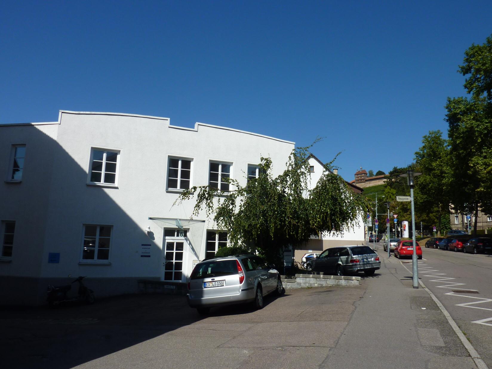 Esslingen. Glasdachfabrik Eberspächer Ecke Hauffstraße/Heugasse (Hauffstr. 6).